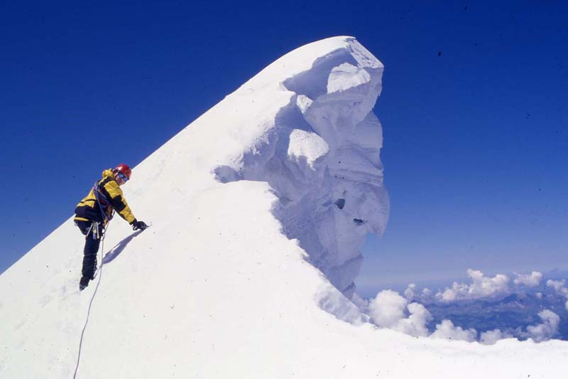 Roberto73, foto fatta da me.